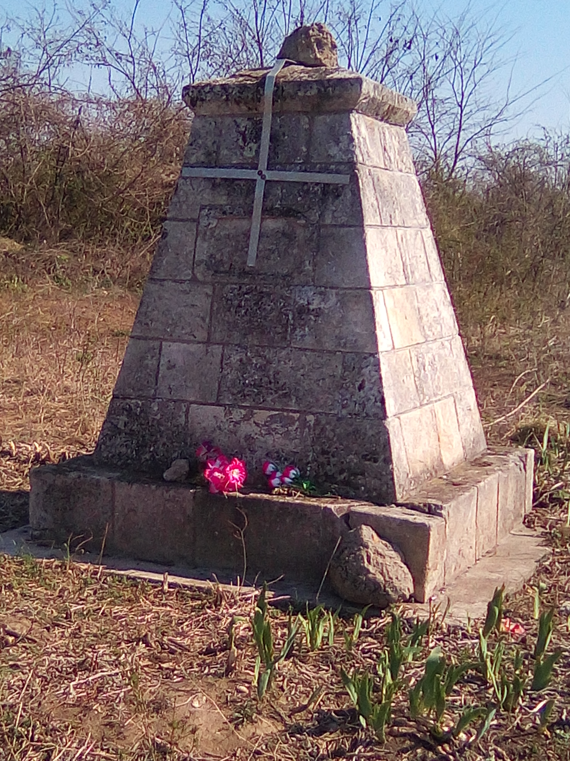 Паметник над братска могила на загинали на 3 юли 1877 г. руски войници в битката за Никопол.